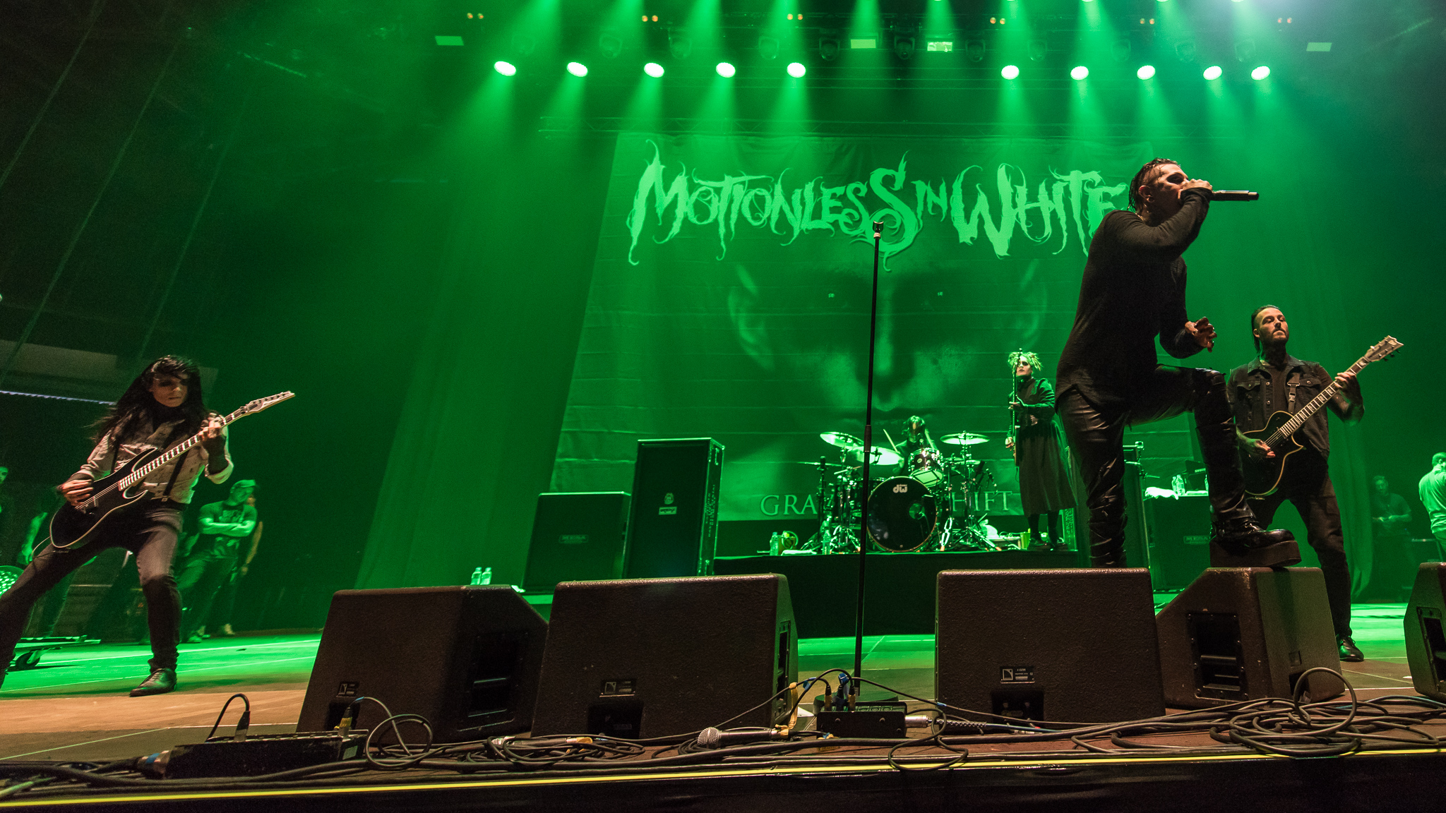 ARGO-Konzerte,Chris „Motionless“ Cerulli,Devin „Ghost“ Sola,Engelbert Strauss Alternarena,Konzert,Livekonzert,Livemusik,Motionless in White,Musik,RiP,Ricky „Horror“ Olson,Rock im Park 2017,Ryan Sitkowski,Vinny Mauro